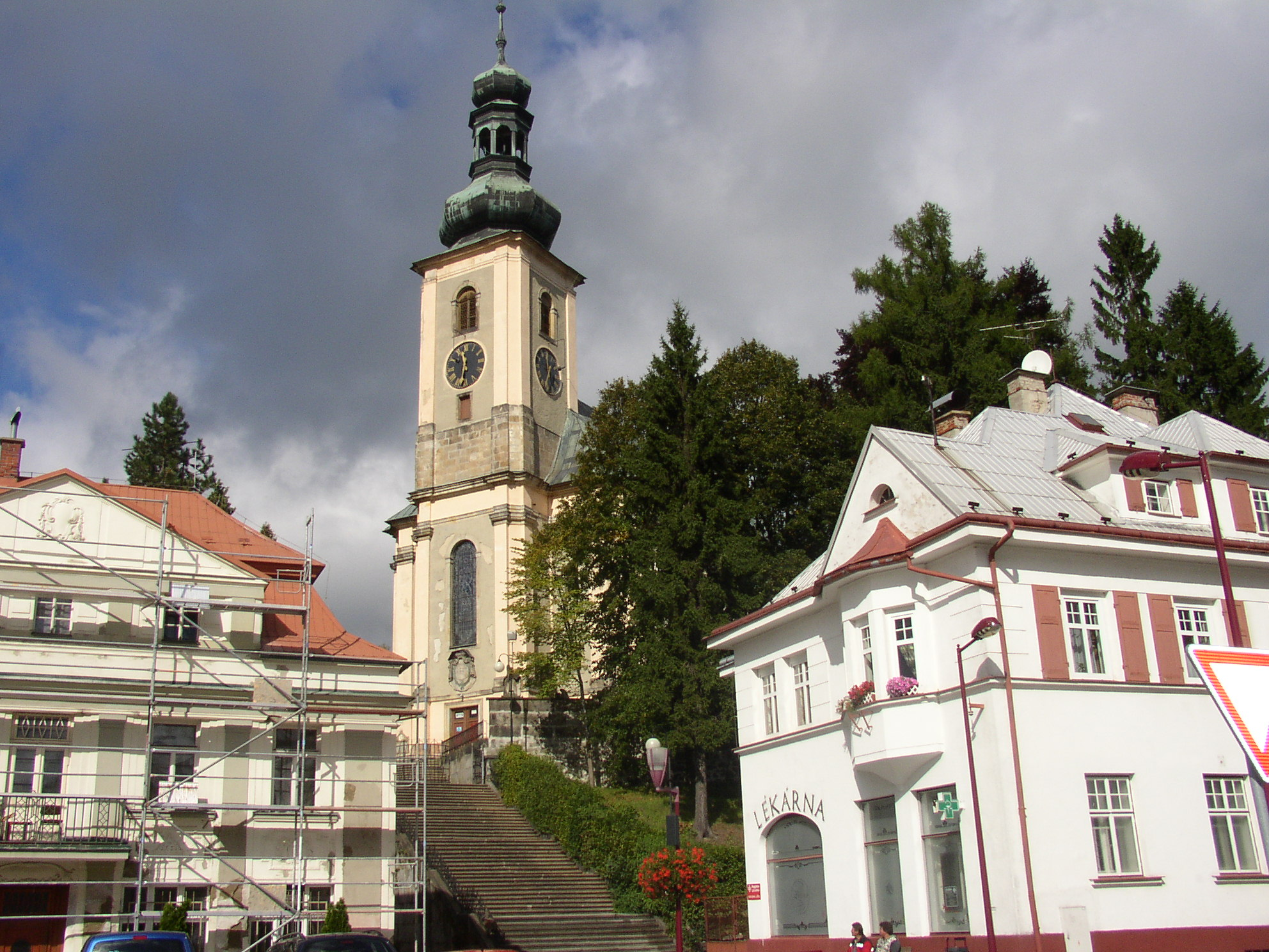 Kostel sv. Máři Magdaleny (Krásná Lípa), Krásná Lípa